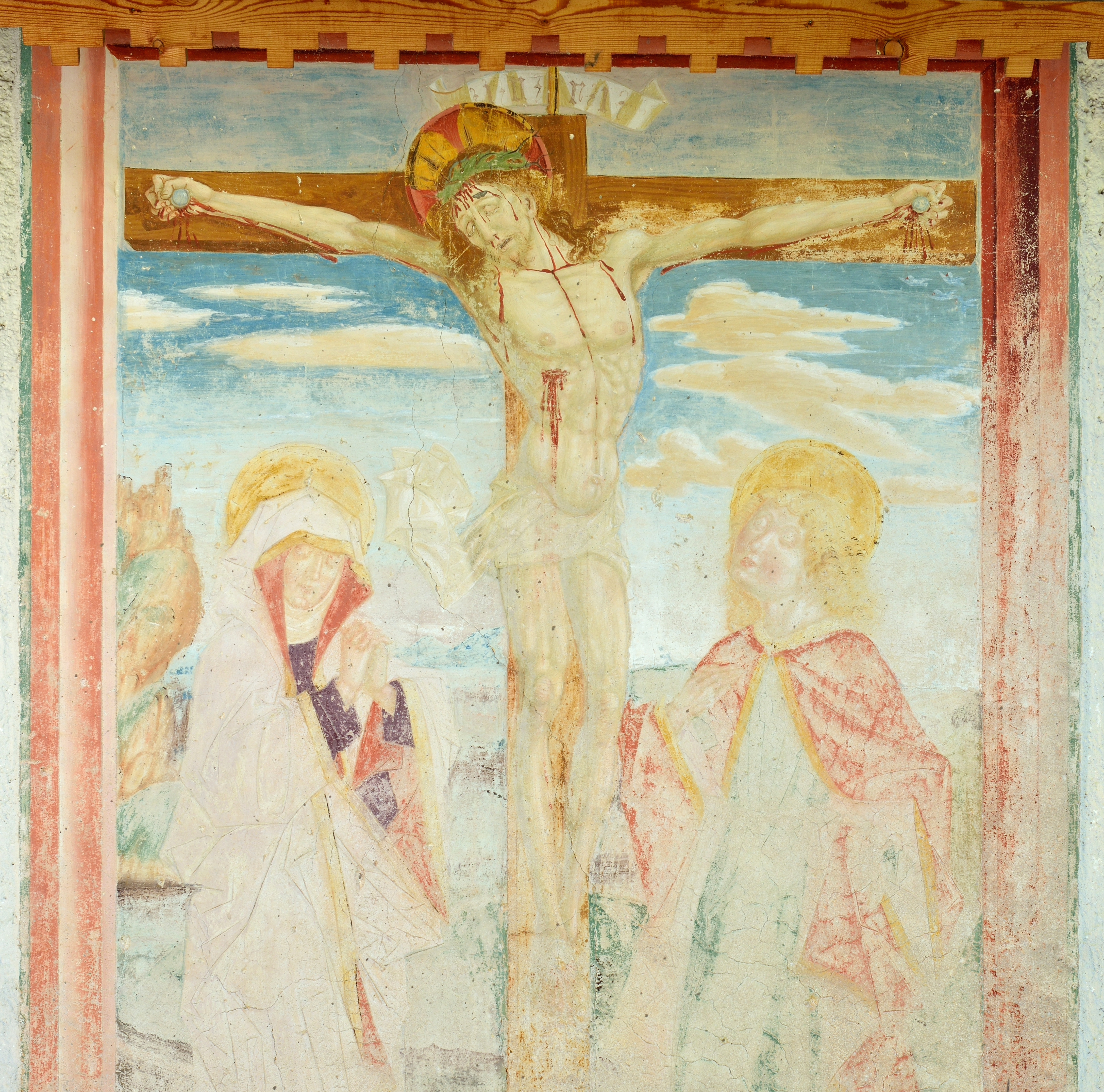 Crucifixion